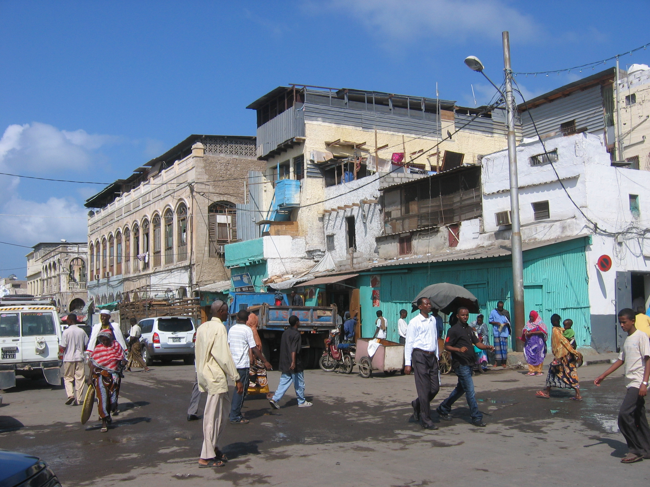 Djibouti city jan 2008